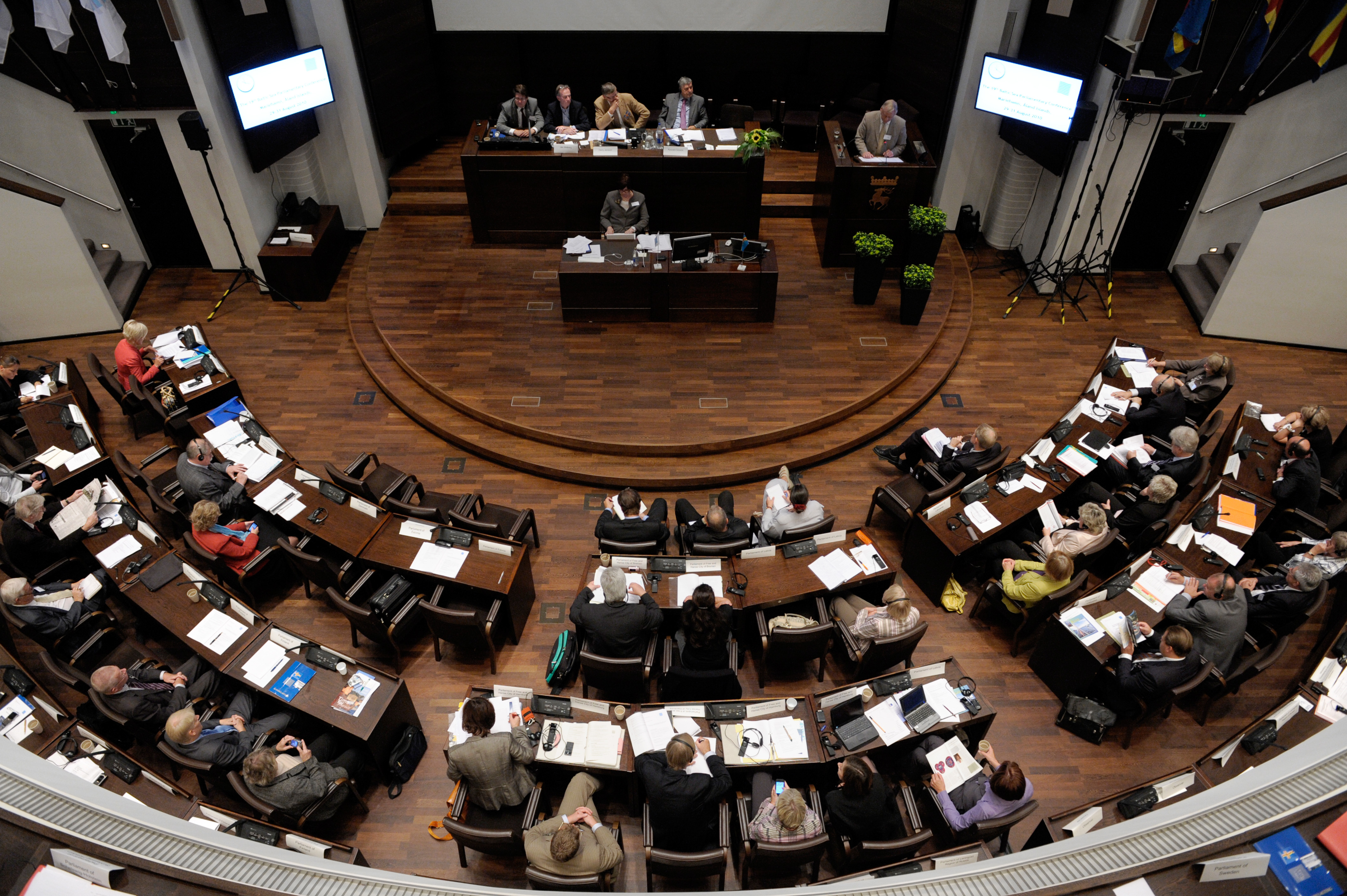 BSPC 19 Mariehamn Åland 2010